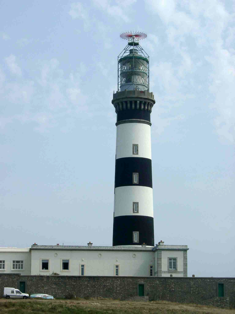 Phare du Creac'h, Ile de Ouessant, Bretagne, France